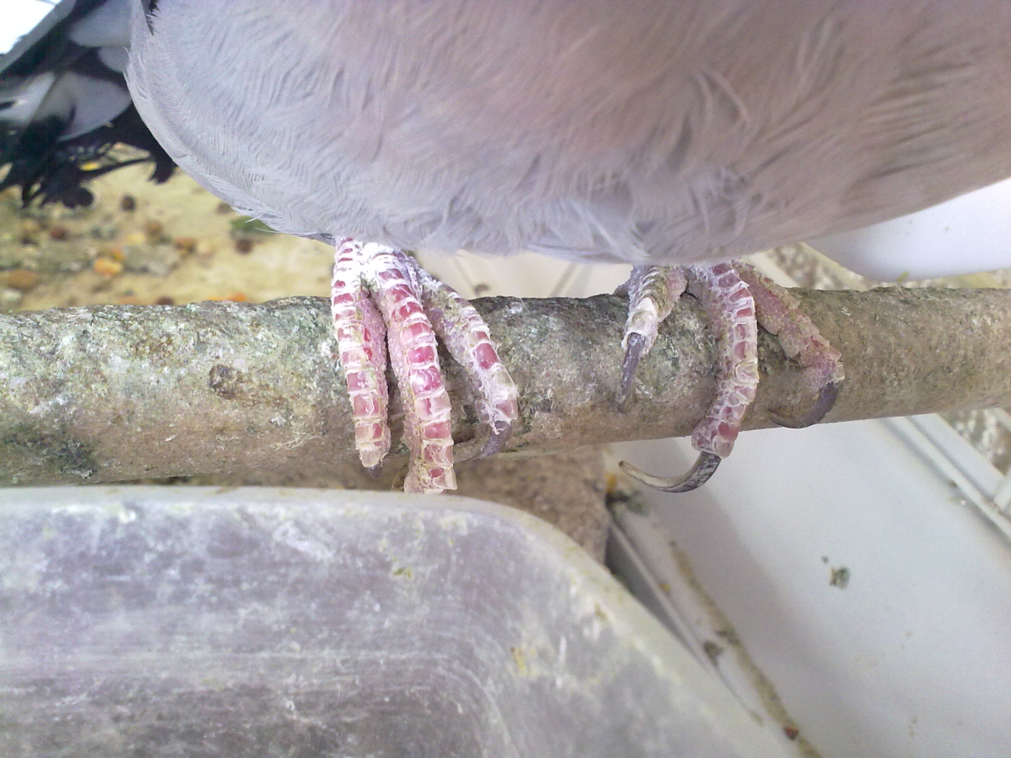 Détail des serres d'une palombe, elle a au moins 7 ans, elle a été capturé dans les Pyrénées Atlantiques, France